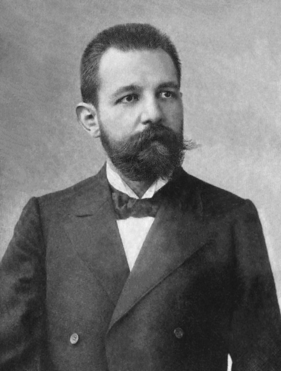 Schachmeister Paul Lipke (um 1900)